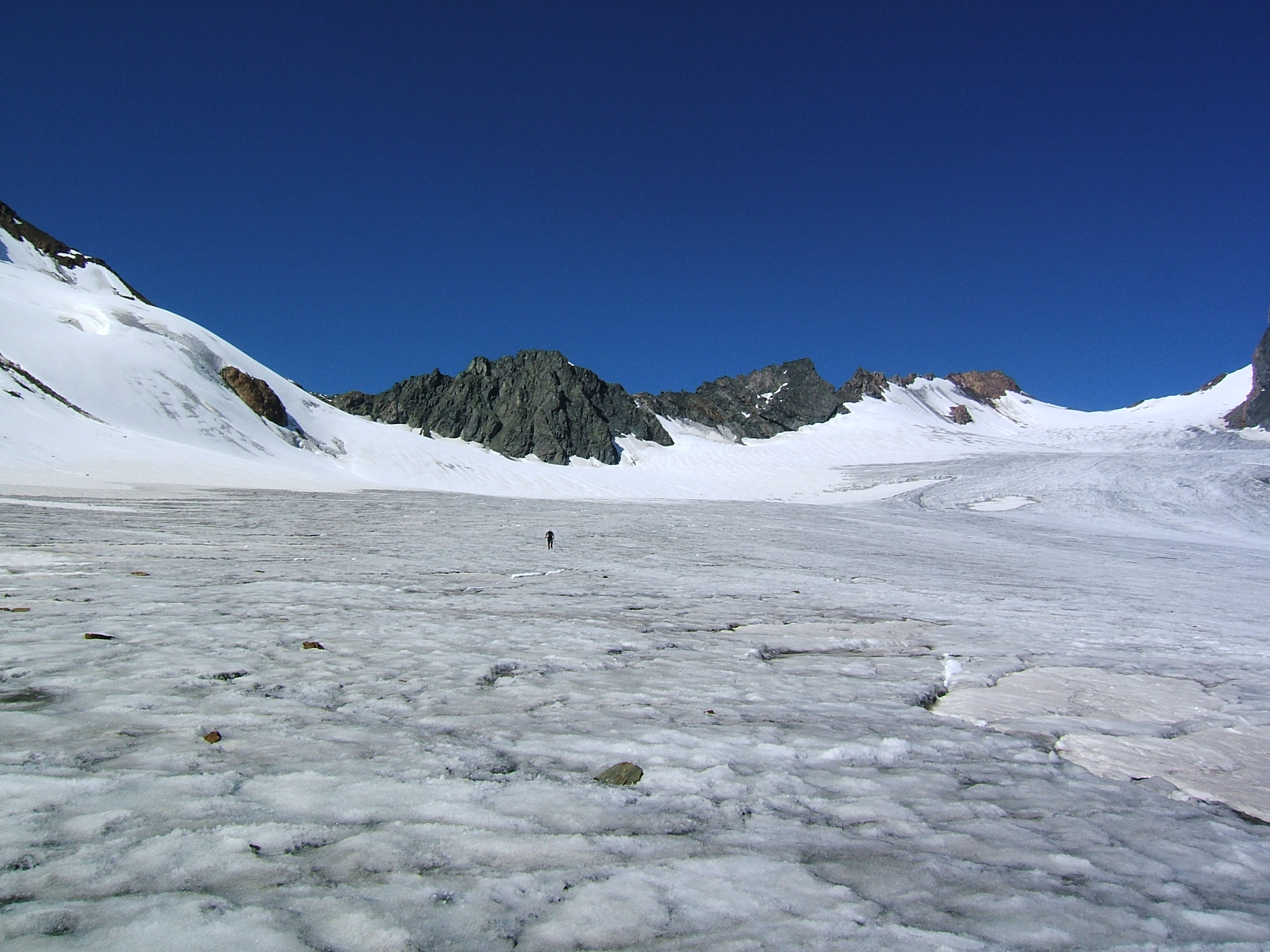 Auf dem Vernagtferner